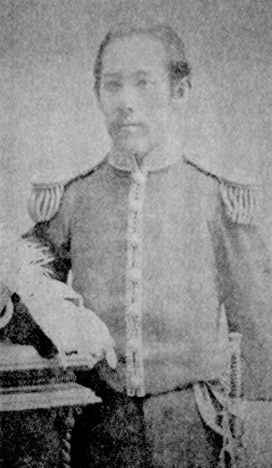 水野忠敬の肖像写真。